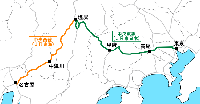 中央本線路線図